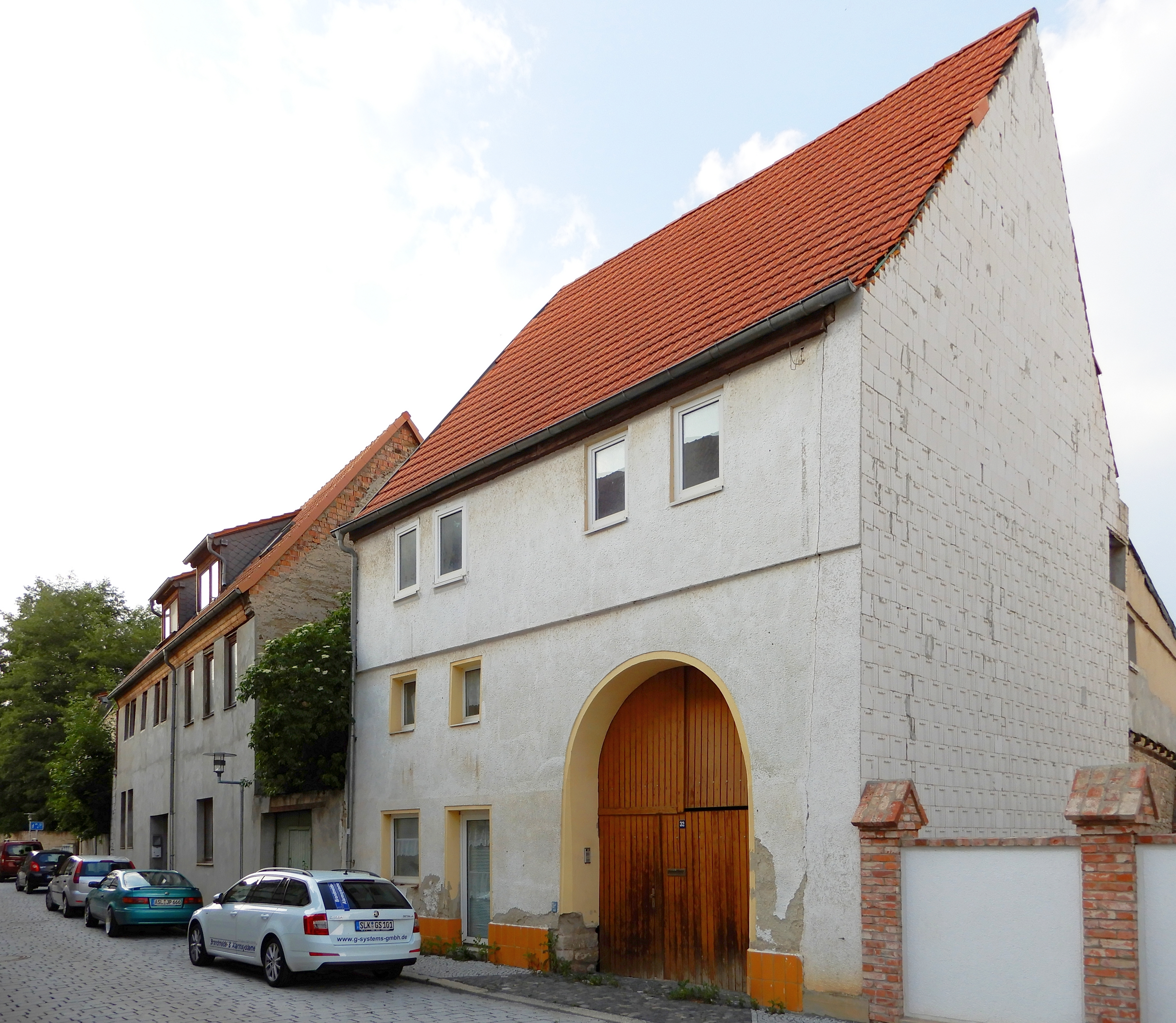 Gebäude Über dem Wasser 32 in Aschersleben